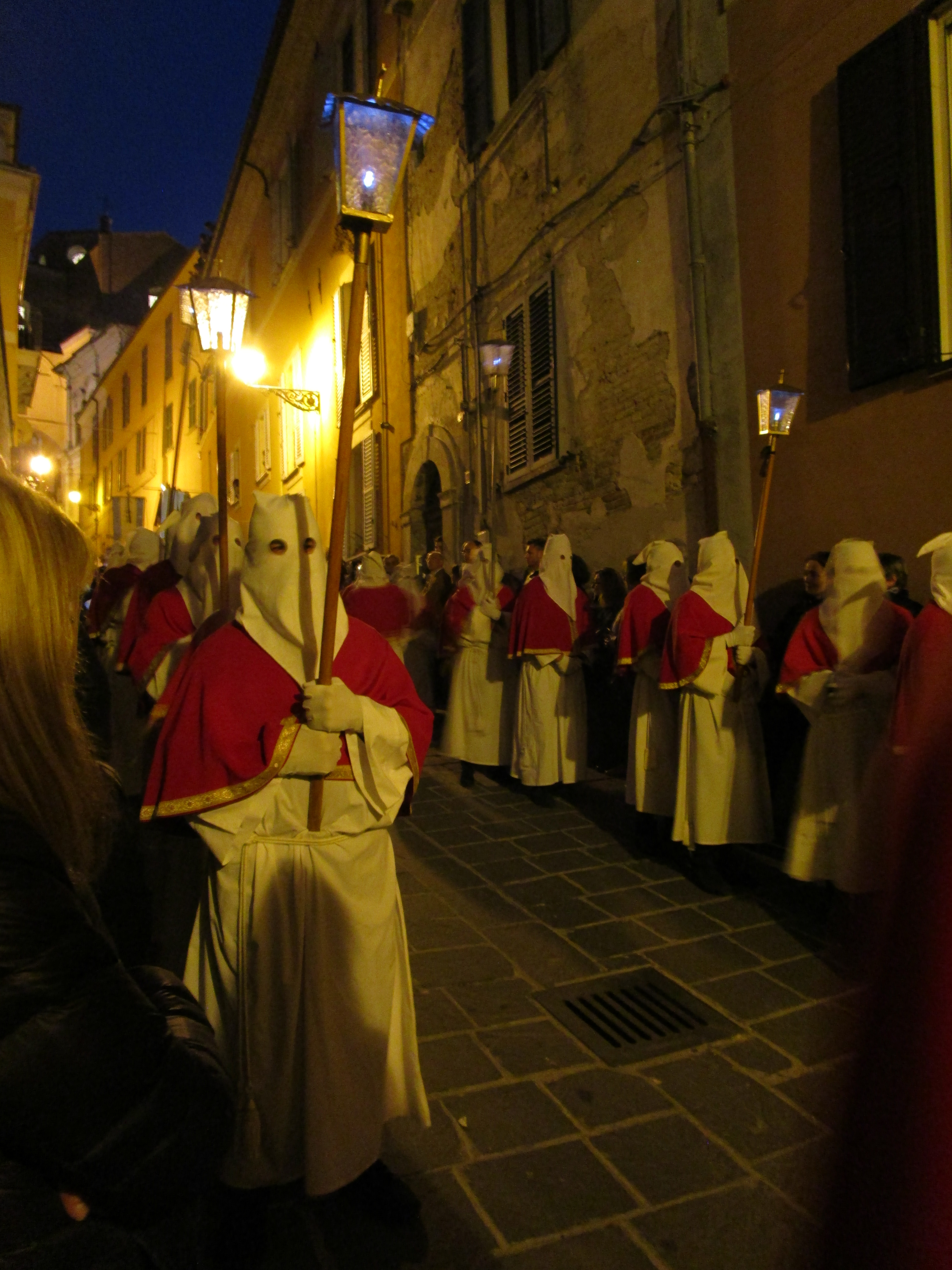 Una delle confraternite che partecipano alla processione del Venerdì Santo di Chieti